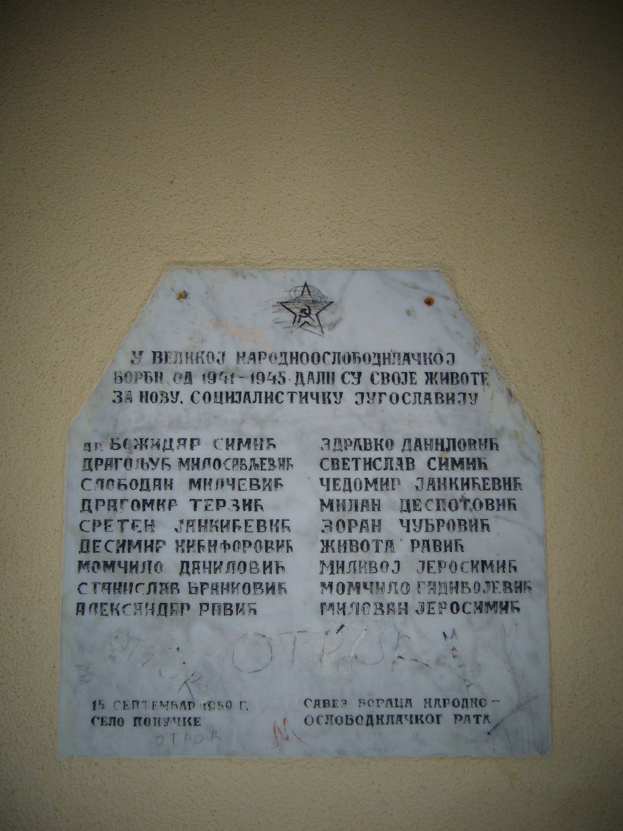 Spomen ploča borcima NOB-a u Popučkama.